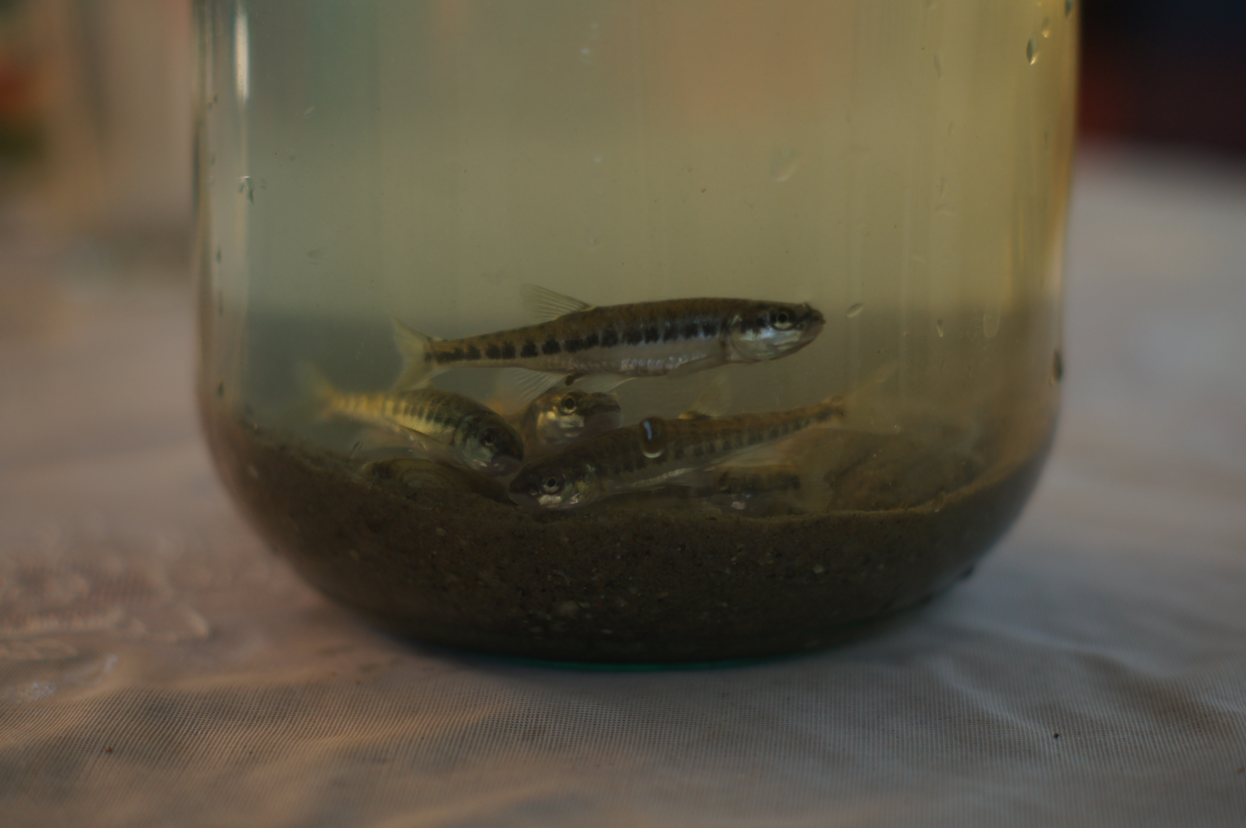 Гольян обыкновенный в банке. Пойман на рыбалке 28 июля 2012 августа.